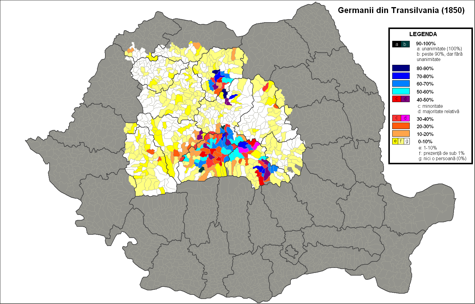 Totalul persoanelor declarate fie drept "saşi", fie drept "germani" la recensământul organizat de autorităţile habsburgice în Transilvania în anul 1850. Harta reprezintă limitele administrative actuale: judeţe, comune, oraşe.